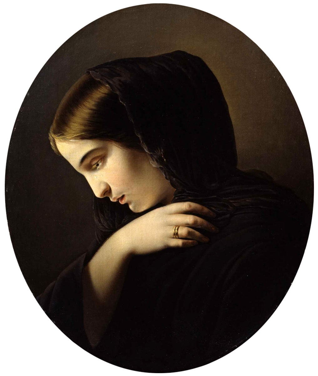 Жанр: Женский портрет Направление: Академизм Год: 1831 Местонахождение: Витебский художественный музей Материалы: холст, масло Размеры: 52 х 44 см